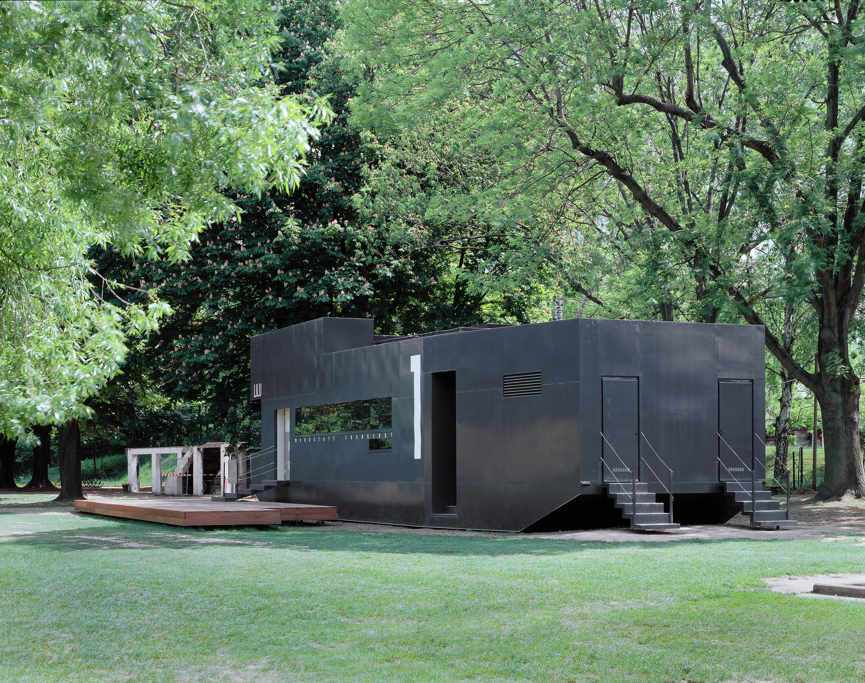 Snackponton im Licht- und Luftbad Frankfurt Meixner Schlüter Wendt Architekten